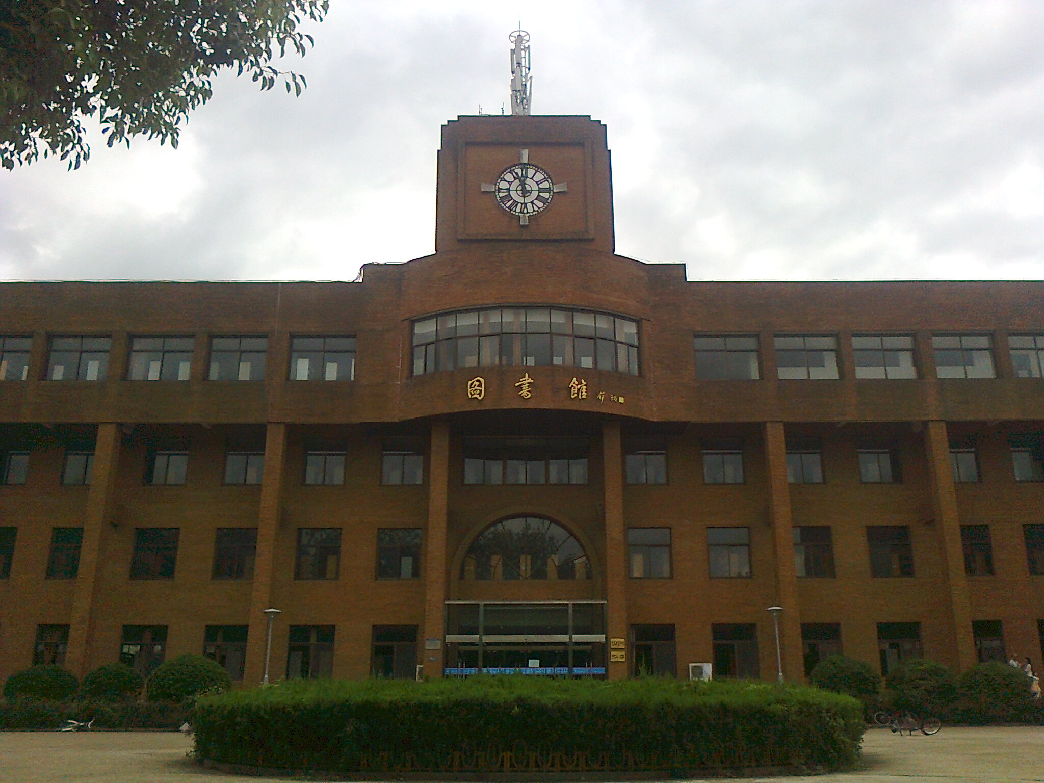 宁波大学图书馆